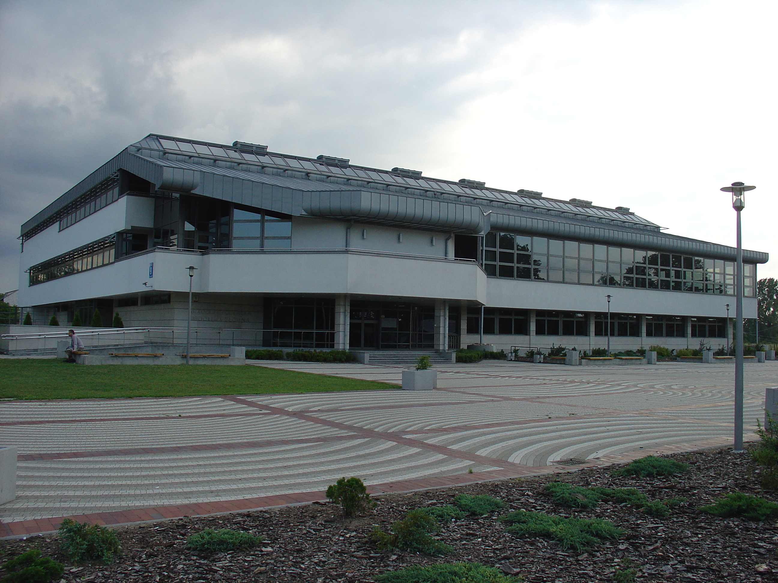 Biblioteka Główna Uniwersytetu Przyrodniczo-Humanistycznego w Siedlcach w Siedlcach